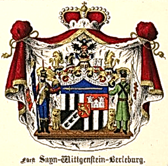 Coat of arms of Furst Sayn-Wittgenstein-Berleburg (Baltisches).